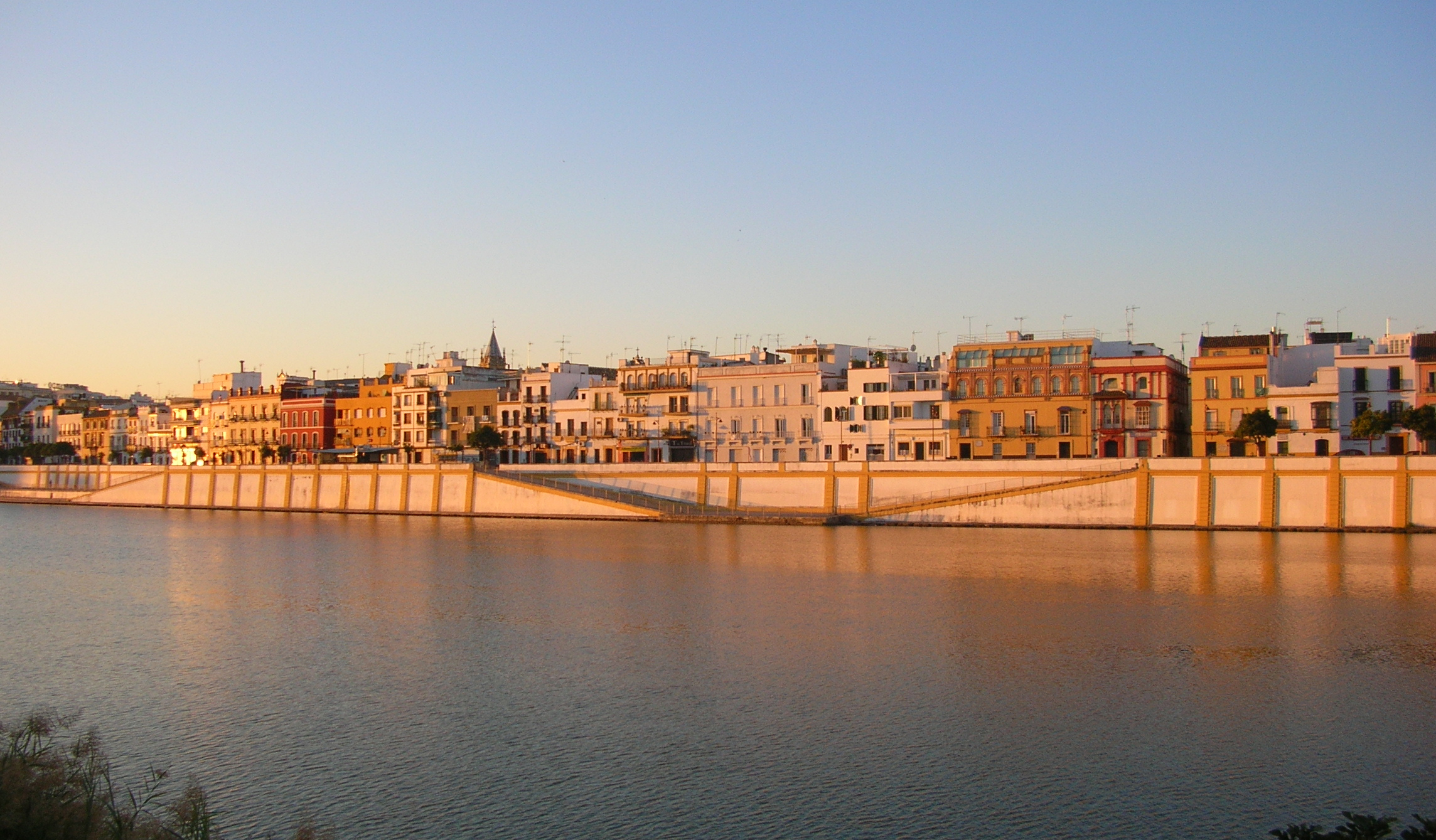 Le Guadalquivir et la Calle Betis, dans le quartier sévillan de Triana